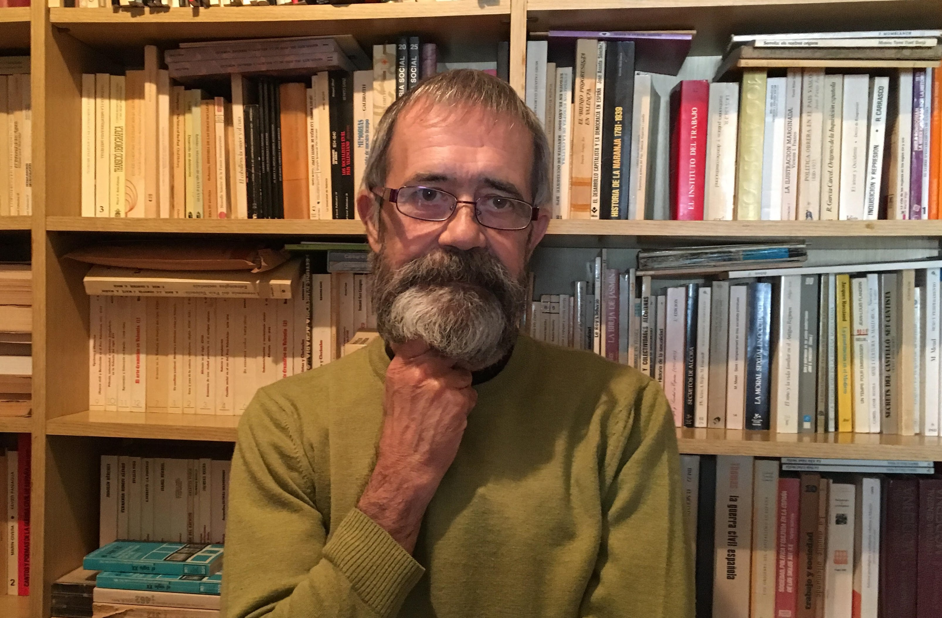 Manuel Cerdà, Naixement 1 de juliol del 1954 Nacionalitat espanyola Ocupació historiador i escriptor